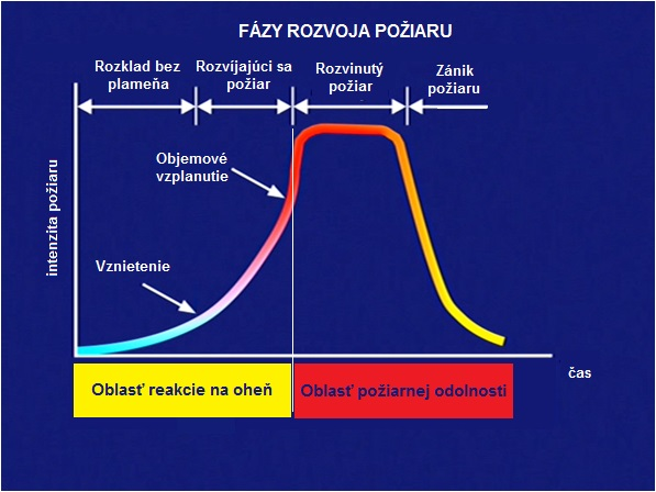 Vzťah triedy reakcie na oheň a požiarnej odolnosti k fázam rozvoja požiaru